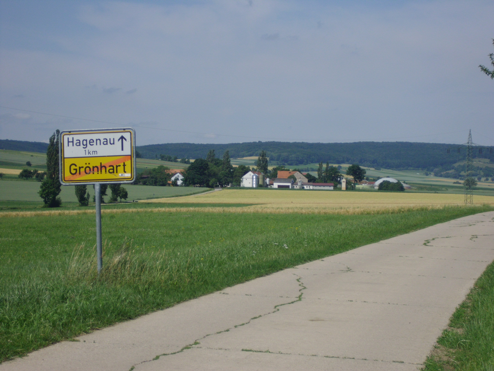 Hagenau, Ortsteil von Treuchtlingen im Landkreis Weißenburg-Gunzenhausen